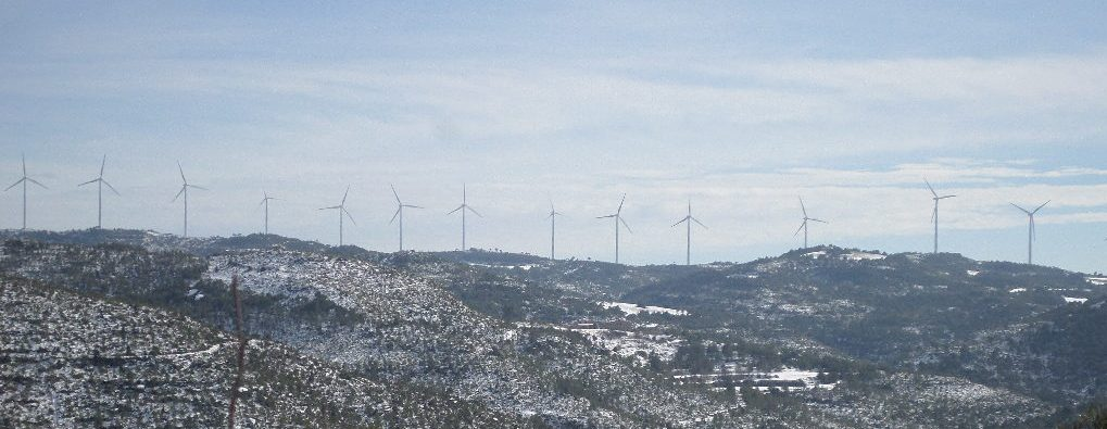 Panoràmica del Parc Eòlic de la Serra de Rubió